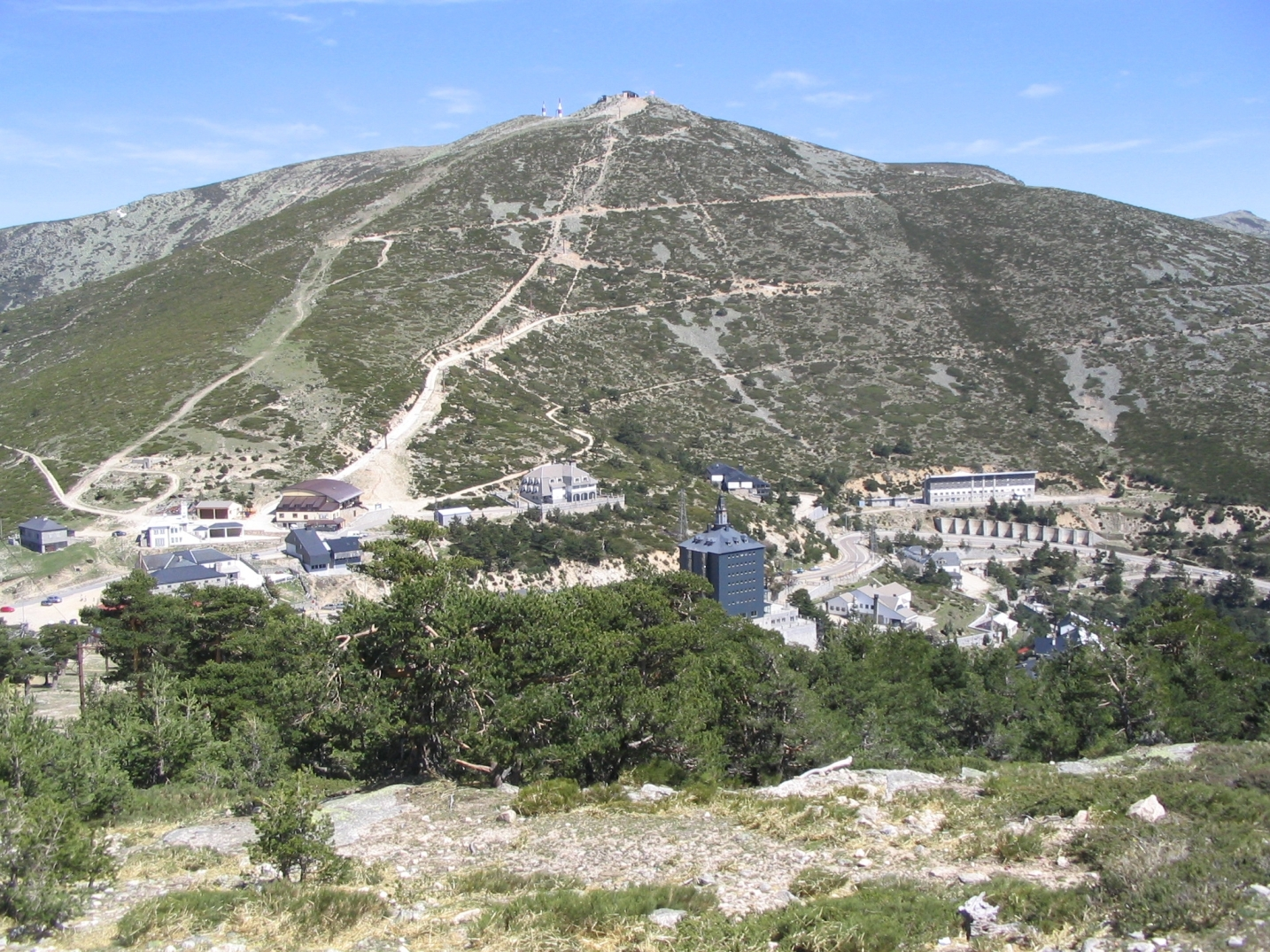 Puerto de Navacerrada (Sierra de Guadarrama, España).